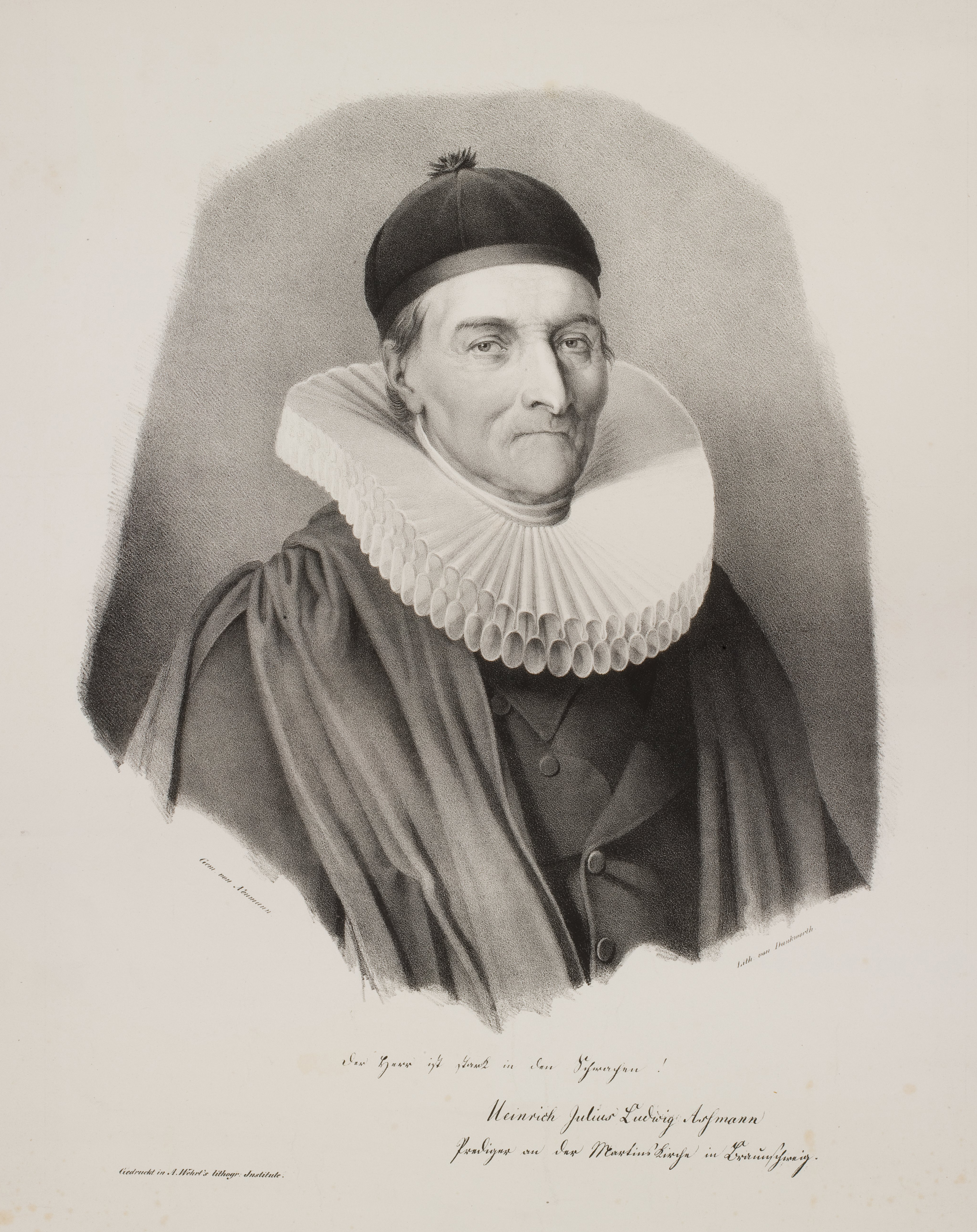 Lithografie des lutherischen Theologen und Predigers an der Martinskirche in Braunschweig Heinrich Julius Ludwig Assmann (1766–1839), wohl Ende der 1830er Jahre geschaffen durch den Stecher August Dankworth nach einem Gemälde von Johann Heinrich Engelbert Neumann, gedruckt im lithographischen Institut von August Wehrt in Brauschweig. Das Blatt mit den Maßen 556 x 434 mm (hier ein Ausschnitt) findet sich in der Porträtsammlung der Herzog-August-Bibliothek in Wolfenbüttel. Die Abbildung in den Maßen circa 340 x 290 mm zeigt den Geistlichen in Halbfigur nach rechts in seinem Talar, mit Mühlradkragen und einem Birett vor einen nur angedeutetem Hintergrund. Unterhalb des Bildes findet sich ein faksimilierter Autograph mit den Worten „Der Herr ist stark in den Schwachen! Heinrich Julius Ludwig Assmann Prediger an der Martinskirche in Braunschweig.“